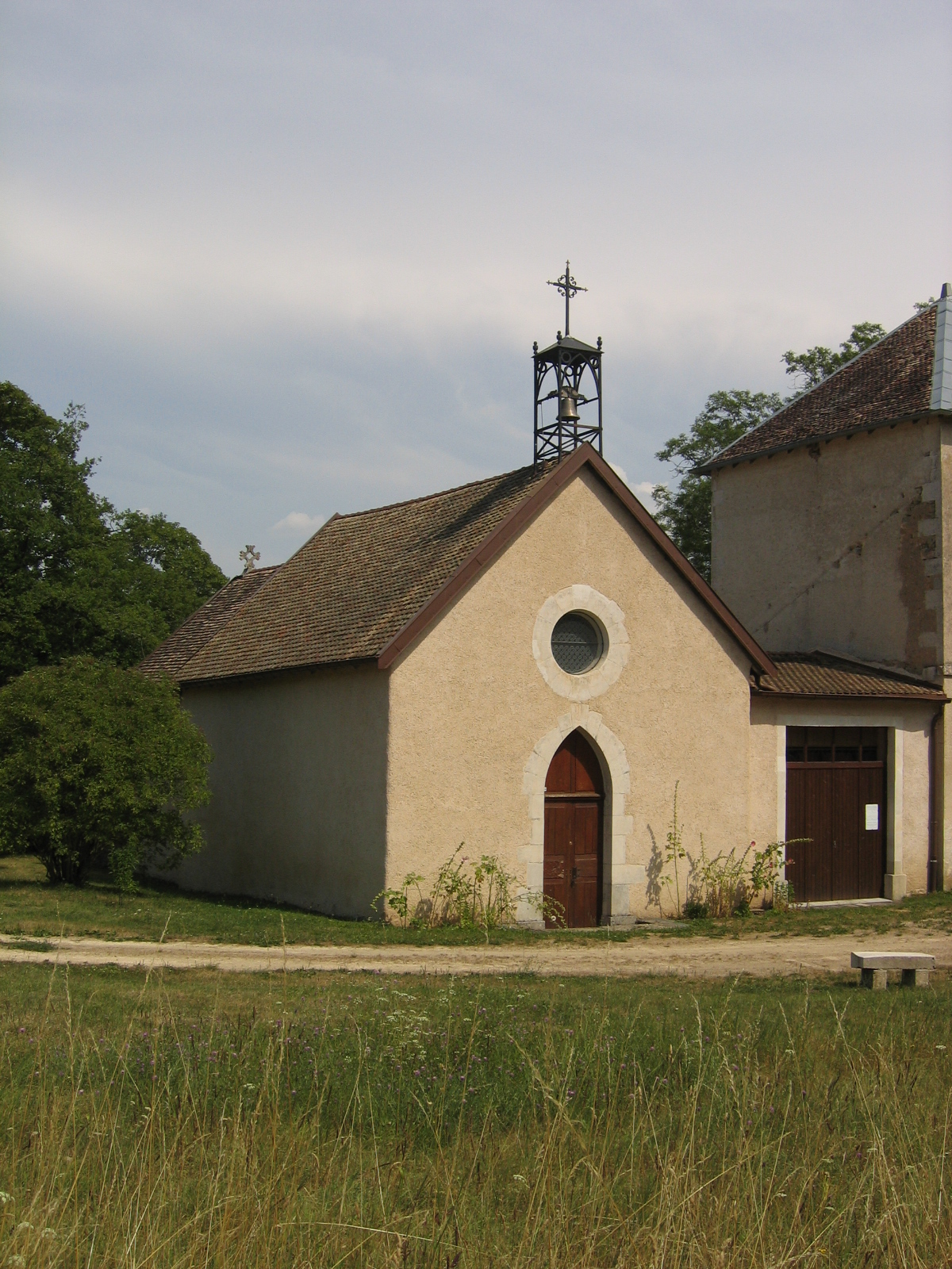 Chapelle de Bermont - vue de face au mois de juillet